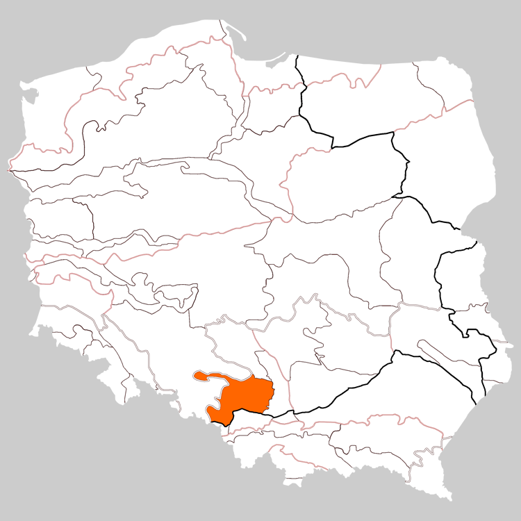 Physico-geographical regionalization of Poland Macroregion 341.1 Silesian Upland Regionalizacja fizycznogeograficzna Polski Makroregion 341.1 Wyżyna Śląska